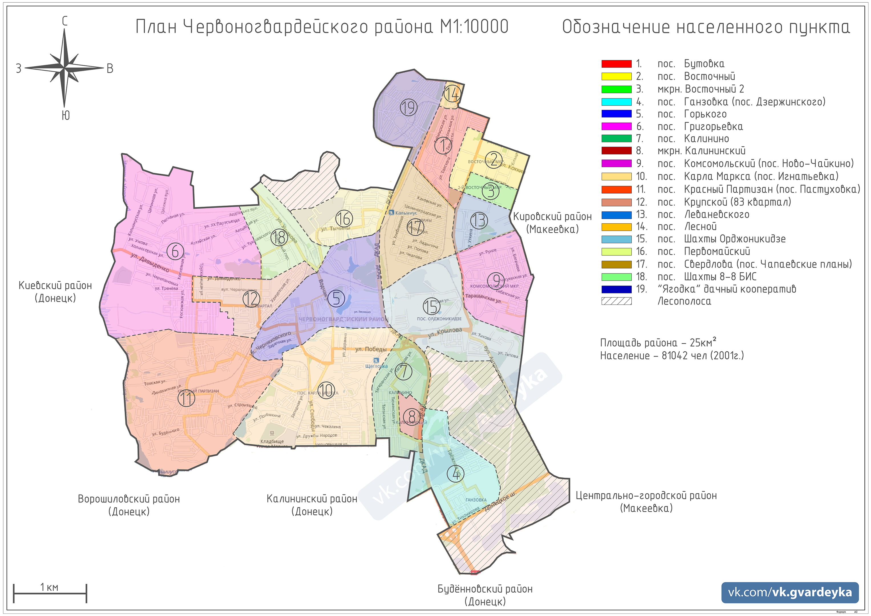 План Червоногвардейского района г. Макеевки. Разработан силами группы "ГВАРДЕЙКА" сайта "ВКонтакте" на основе карт "Яндекс"